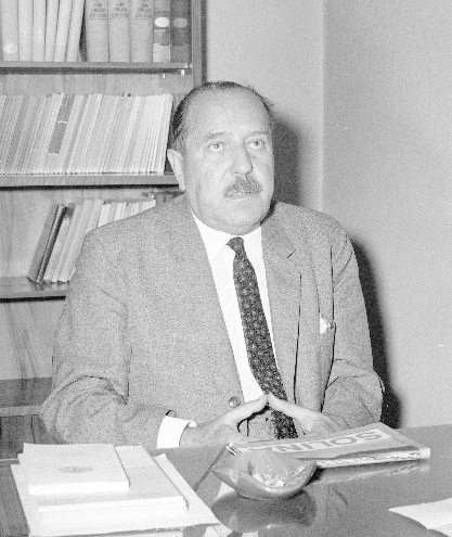 Фотография на Бронислав Вечоркевич, полски езиковед